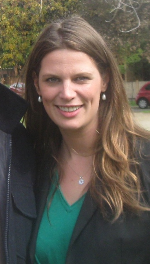 Kate Ellis.